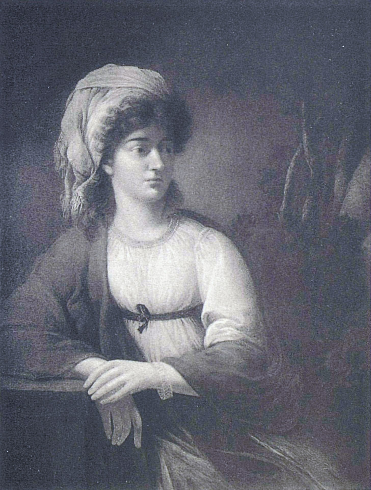 Вера Петровна Васильчикова (1780-1814), урождённая Протасова, жена с 1801 года И.В.Васильчикова (1776-1847); племянница камер-фрейлины А.С.Протасовой.